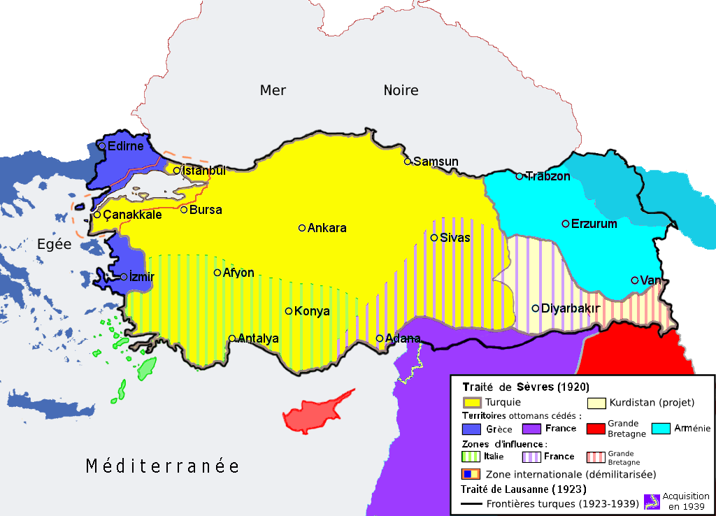 Carte (en français) du Traité de Sèvres (1920). Traduction de Image:TreatyOfSevres (corrected).PNG par Str1977